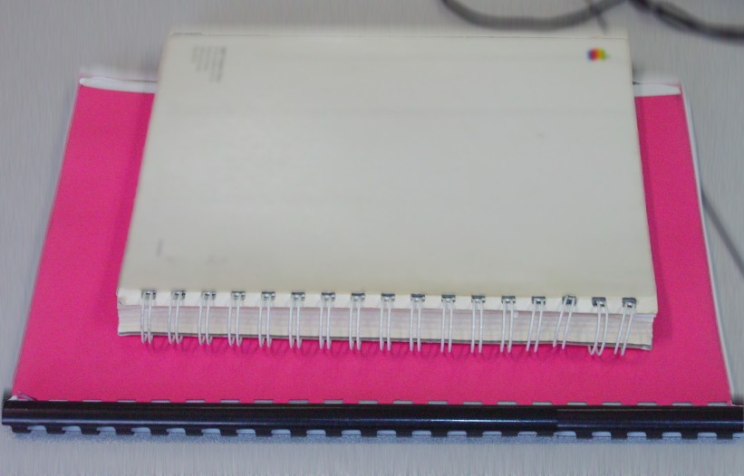 image persoCommons